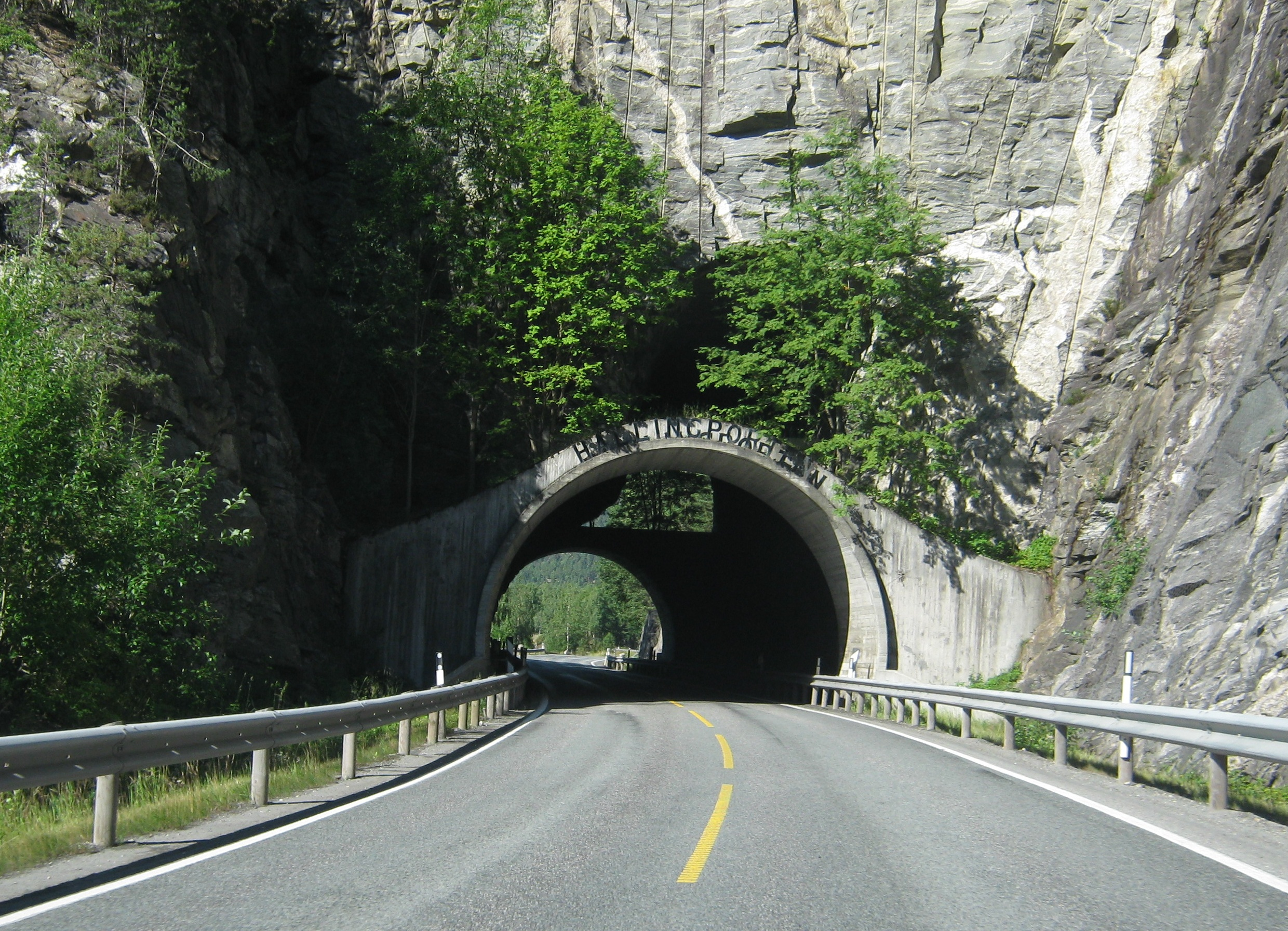 Tunnelen Hallingporten i Hallingdal.